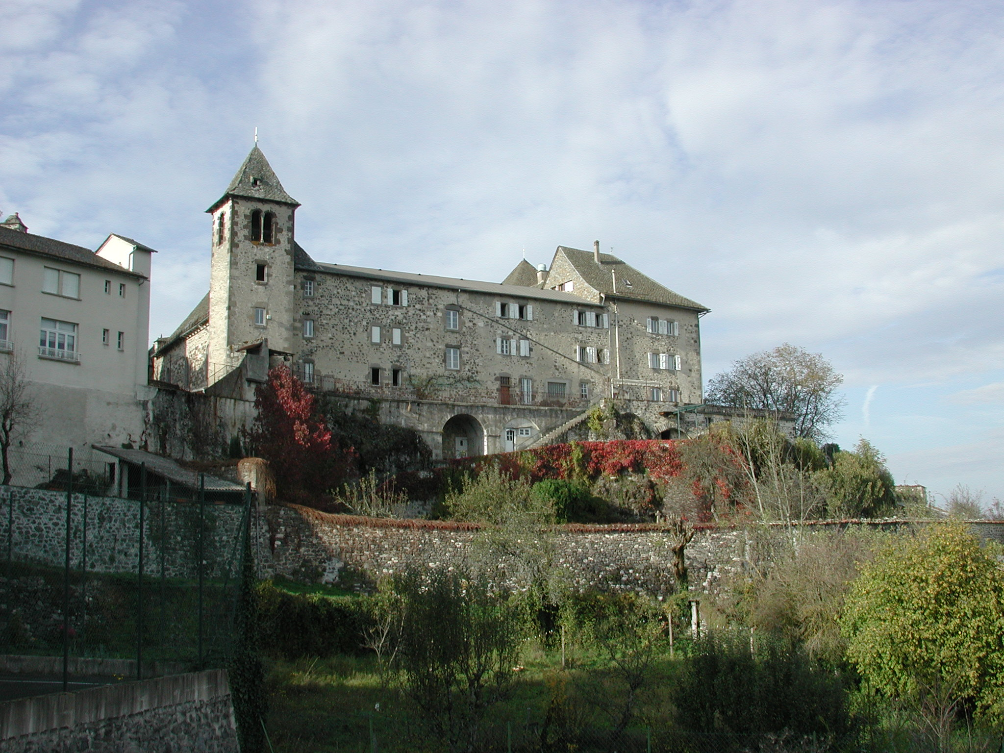 Monastère Sainte-Claire, commune de Mur-de-Barrez, Aveyron, France.